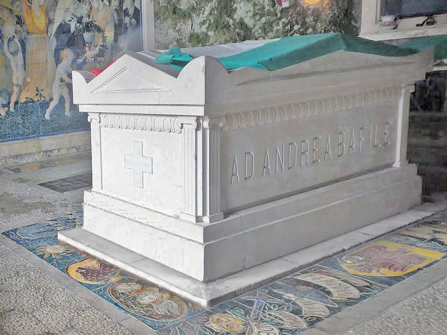 Immagine fotografata dall'album di famiglia che ne ha autorizzato l'uso.